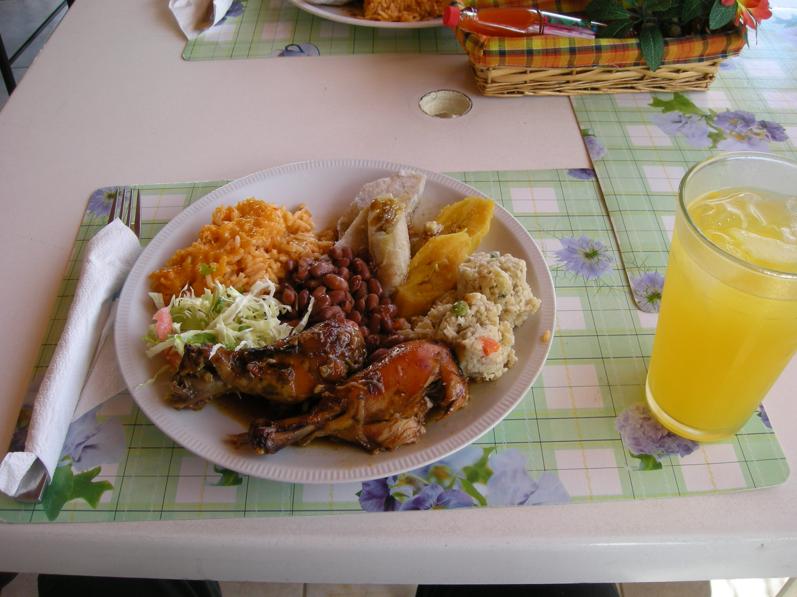 ドミニカ国で食べられる一般的なクレオール料理